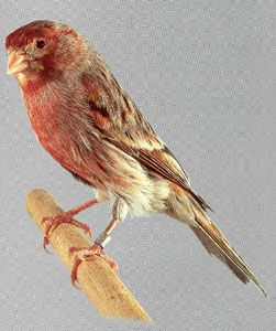 pigment voorkoming 2